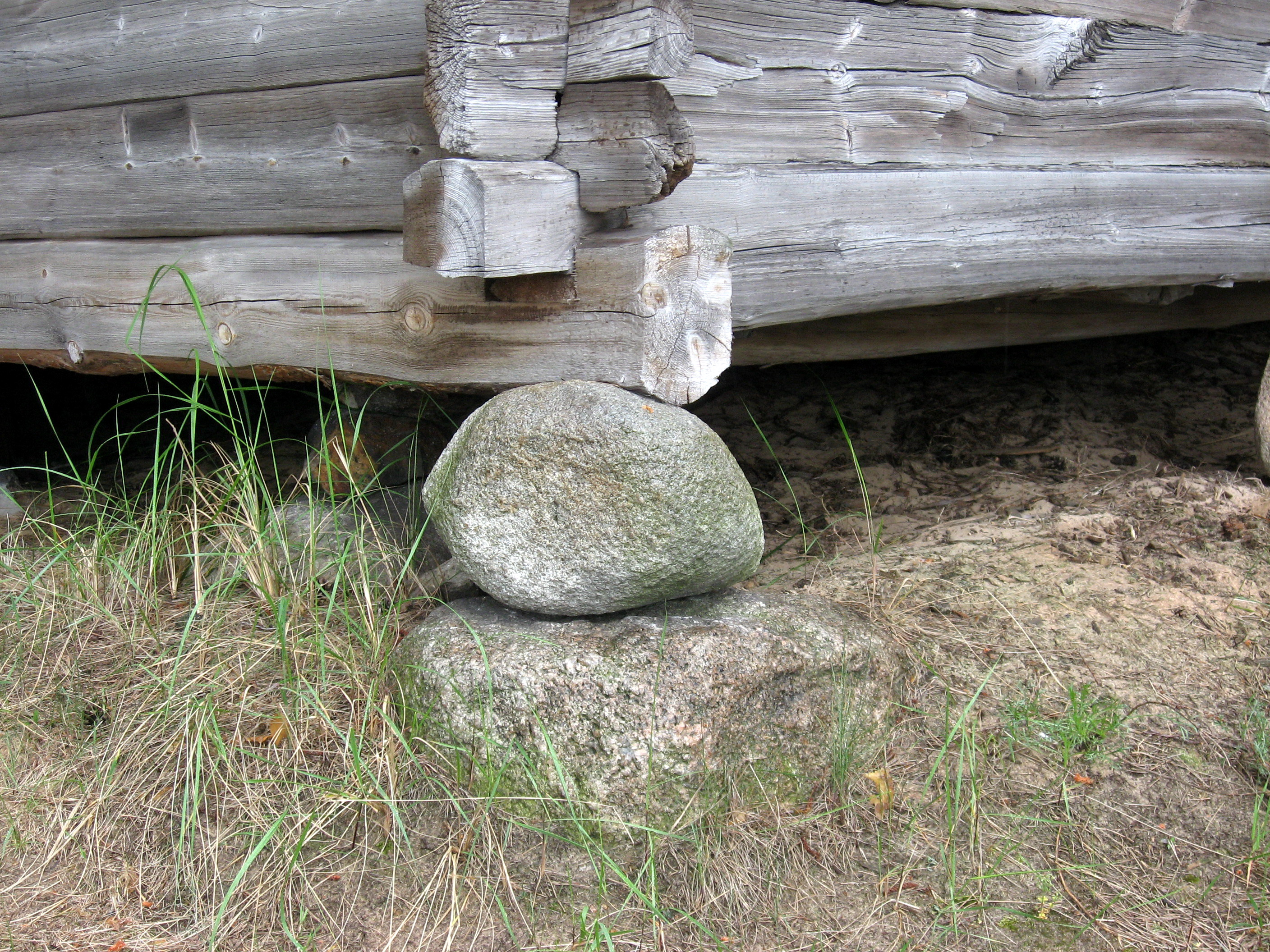 Lotyšské etnografické muzeum v přírodě